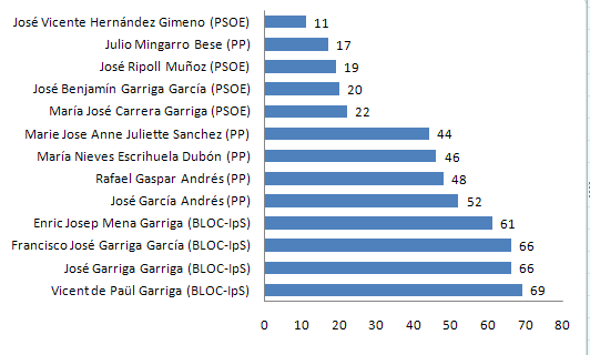 Número de votos por candidato en las elecciones locales de 2007